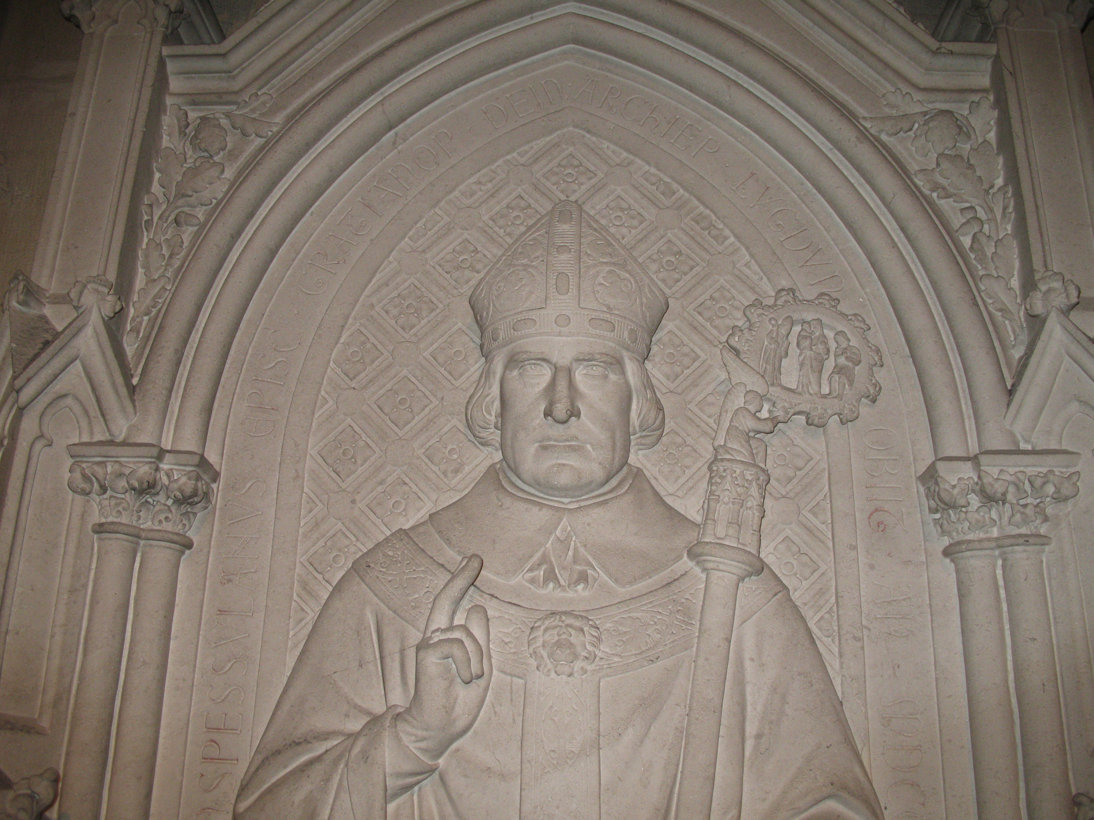 Jacques Marie Achille Ginoulhiac